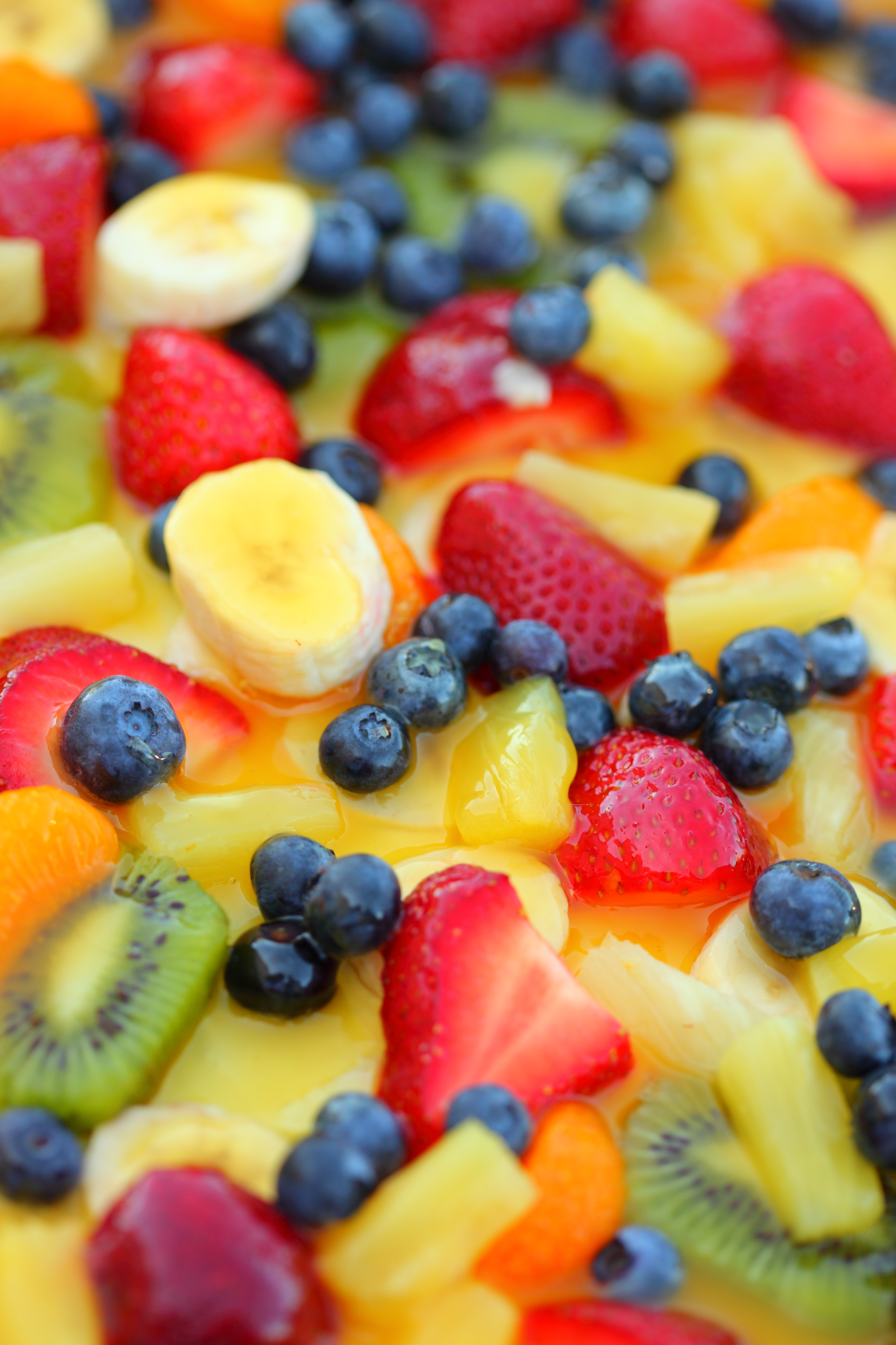 Sweet Summer Rainbow Fruit Salad